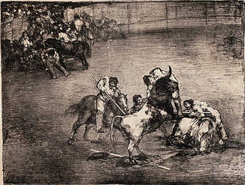 «Bravo toro» Litografía perteneciente a "Los toros de Burdeos"